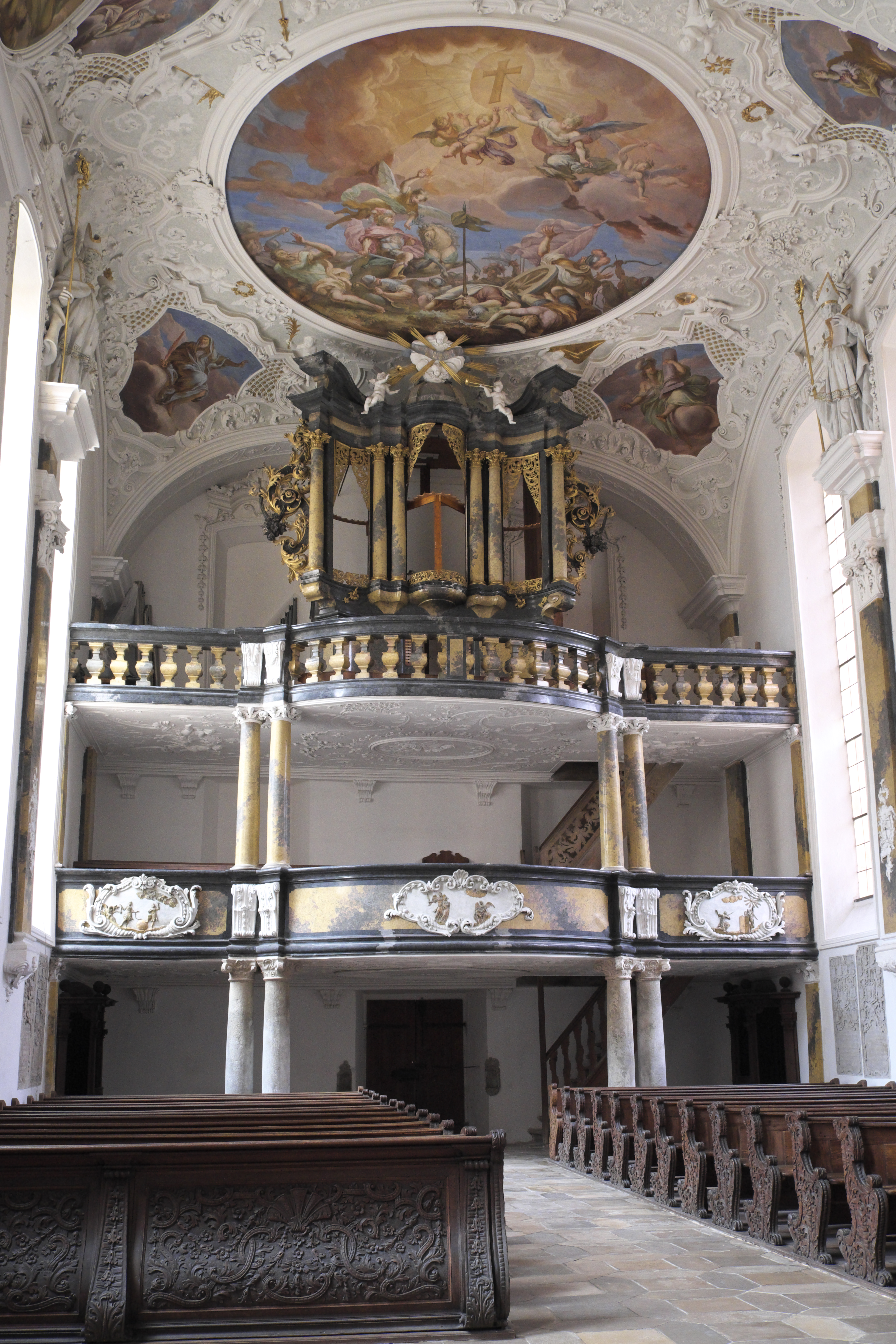 Schlosskirche des ehemaligen Deutschordensschlosses in Ellingen im Landkreis Weißenburg-Gunzenhausen (Mittelfranken/Bayern), Innenraum mit Blick zur zweigeschossigen Orgelempore